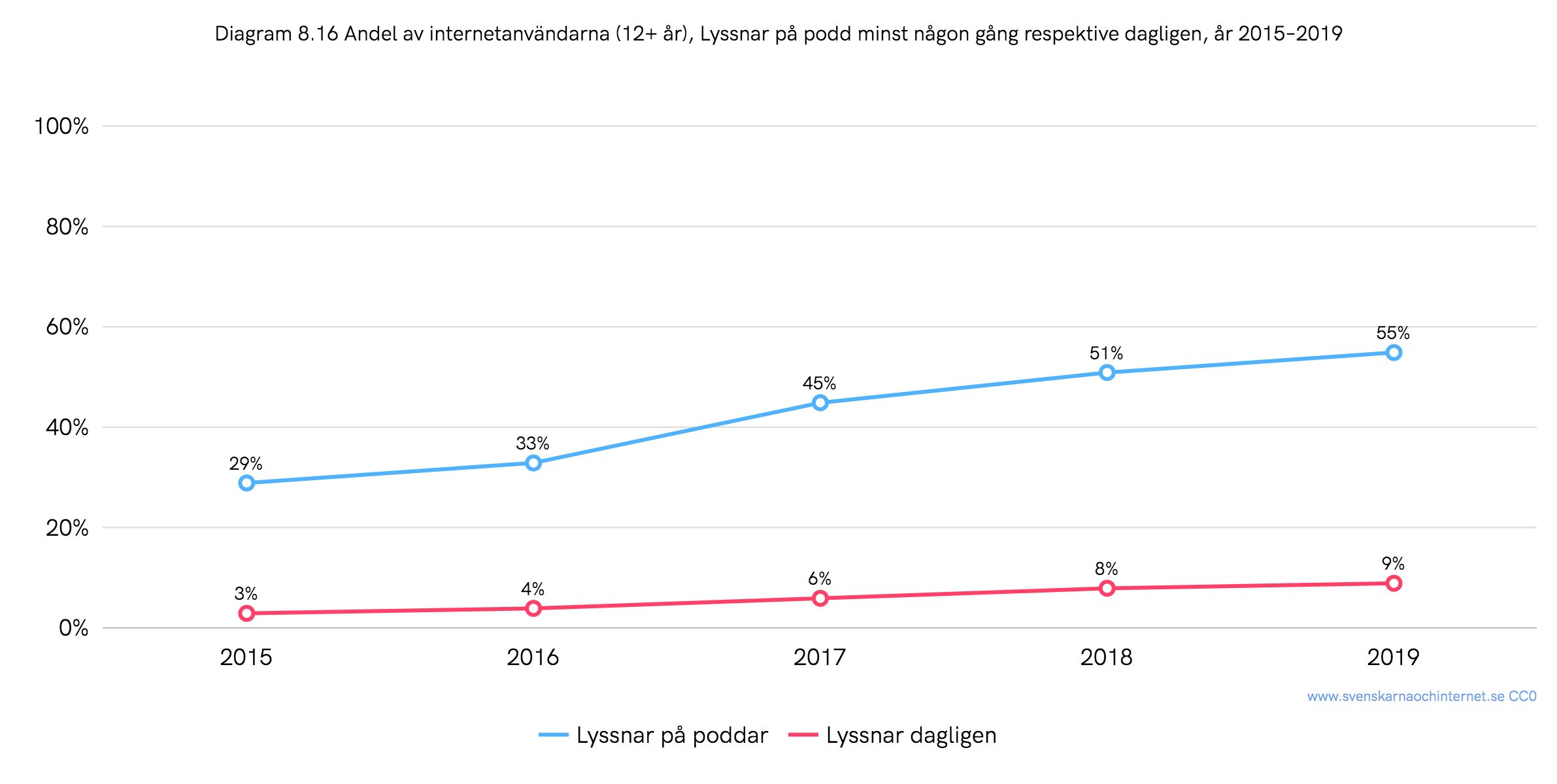 Andel av de svenska internetanvändarna (12+ år) som lyssnar på podd minst någon gång respektive dagligen, år 2015–2019. Siffror från undersökningen "Svenskarna och internet".